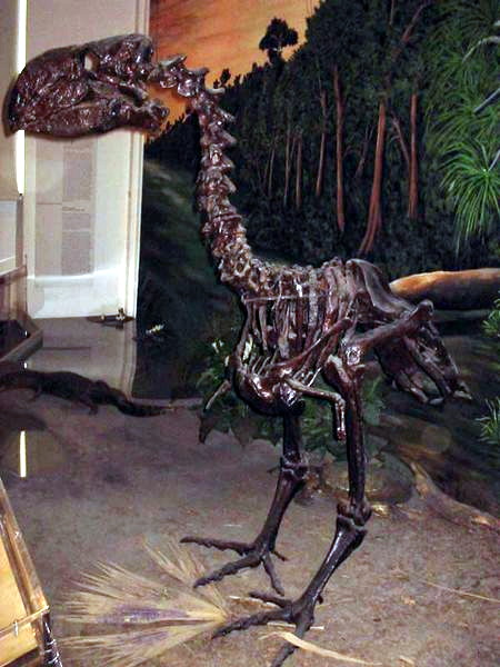 Gastornis fossil skeleton